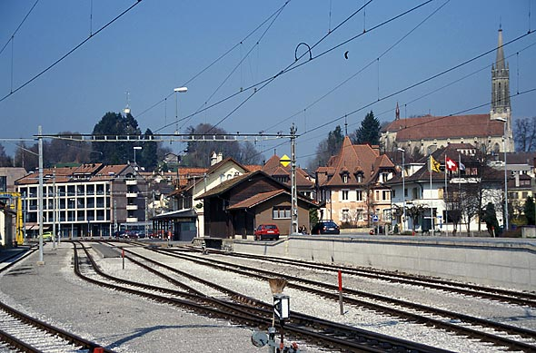 La gare (Bahnhof) de Châtel-St-Denis